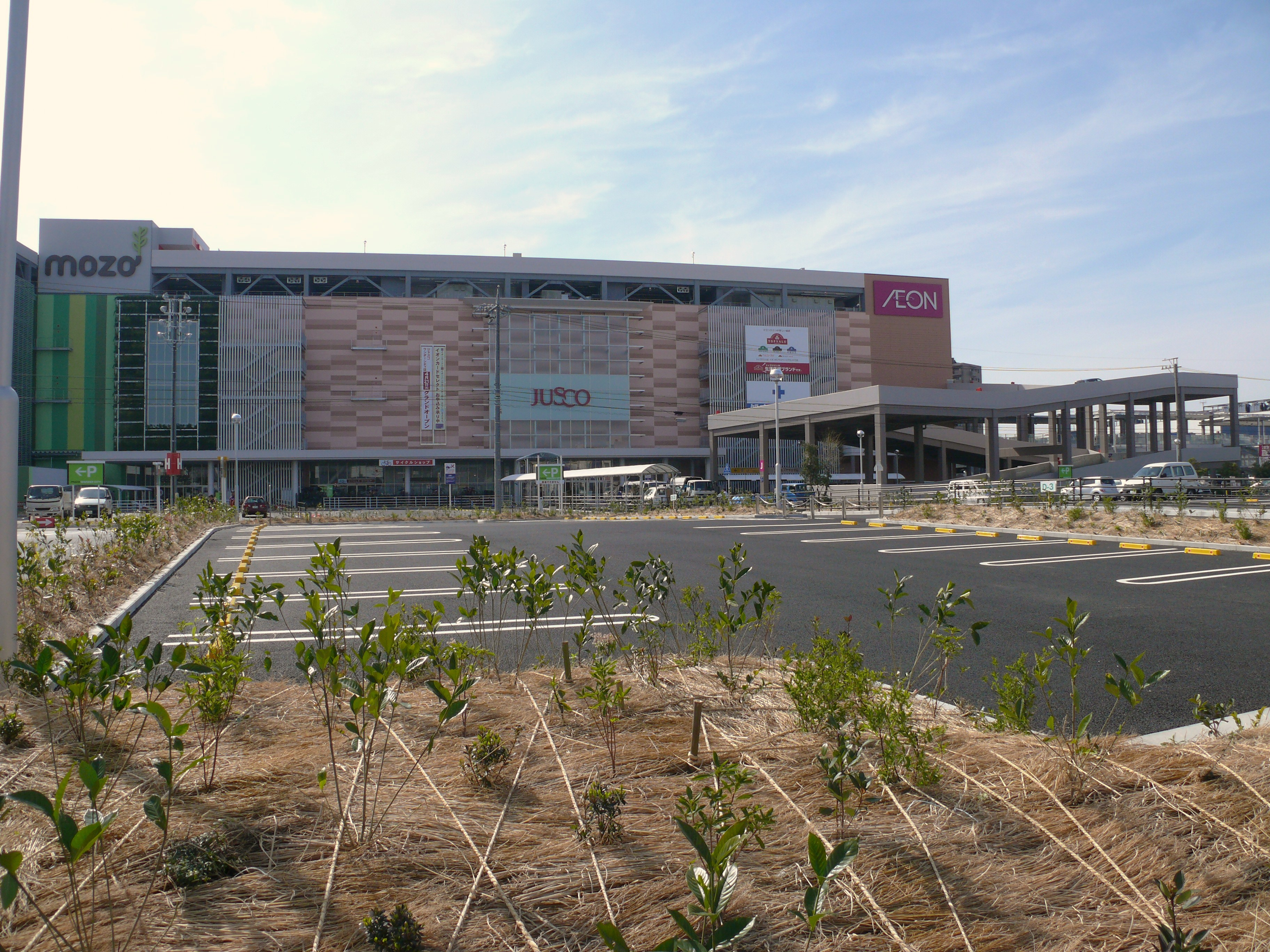 イオングループのショッピングセンター「MOZO（モゾ）ワンダーシティ（旧イオンモール名古屋ワンダーシティ」